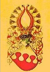 Logo der Oswald von Wolkenstein-Gesellschaft, Screenshot/Detailaufnahme von